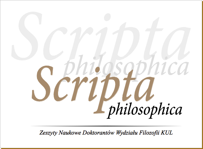 Scripta Philosophica - okładka czasopisma